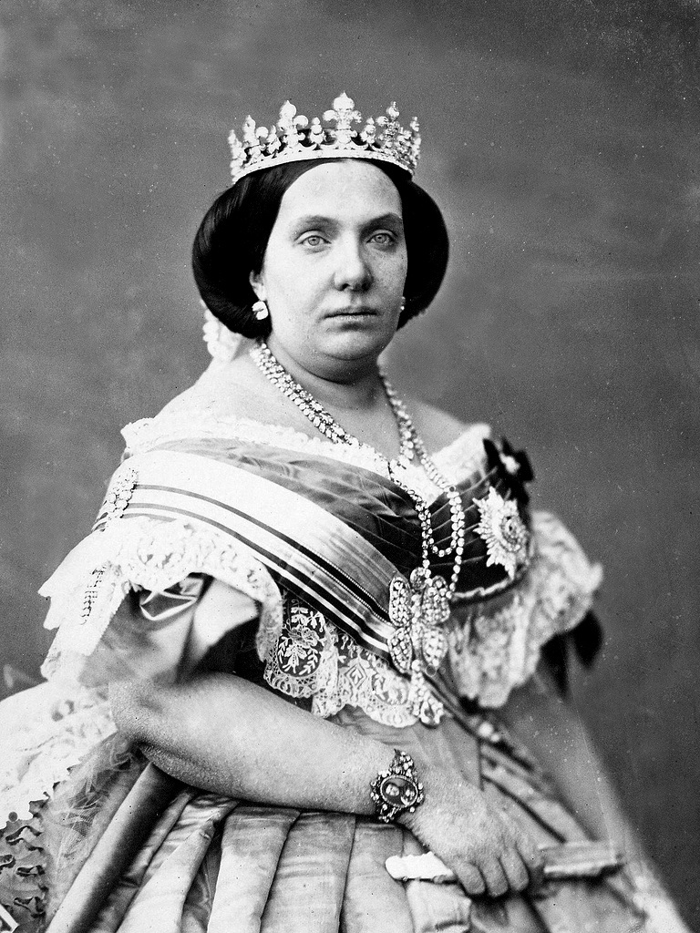 Retrato fotográfico de la reina de España Isabel II